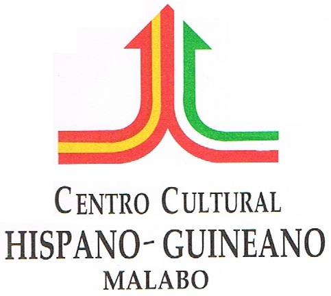 Logo del Centro Cultural Hispano Guineano, reconvertido en los Centros Culturales de España en Malabo y Bata tras la disolución del Patronato rector en 2003.